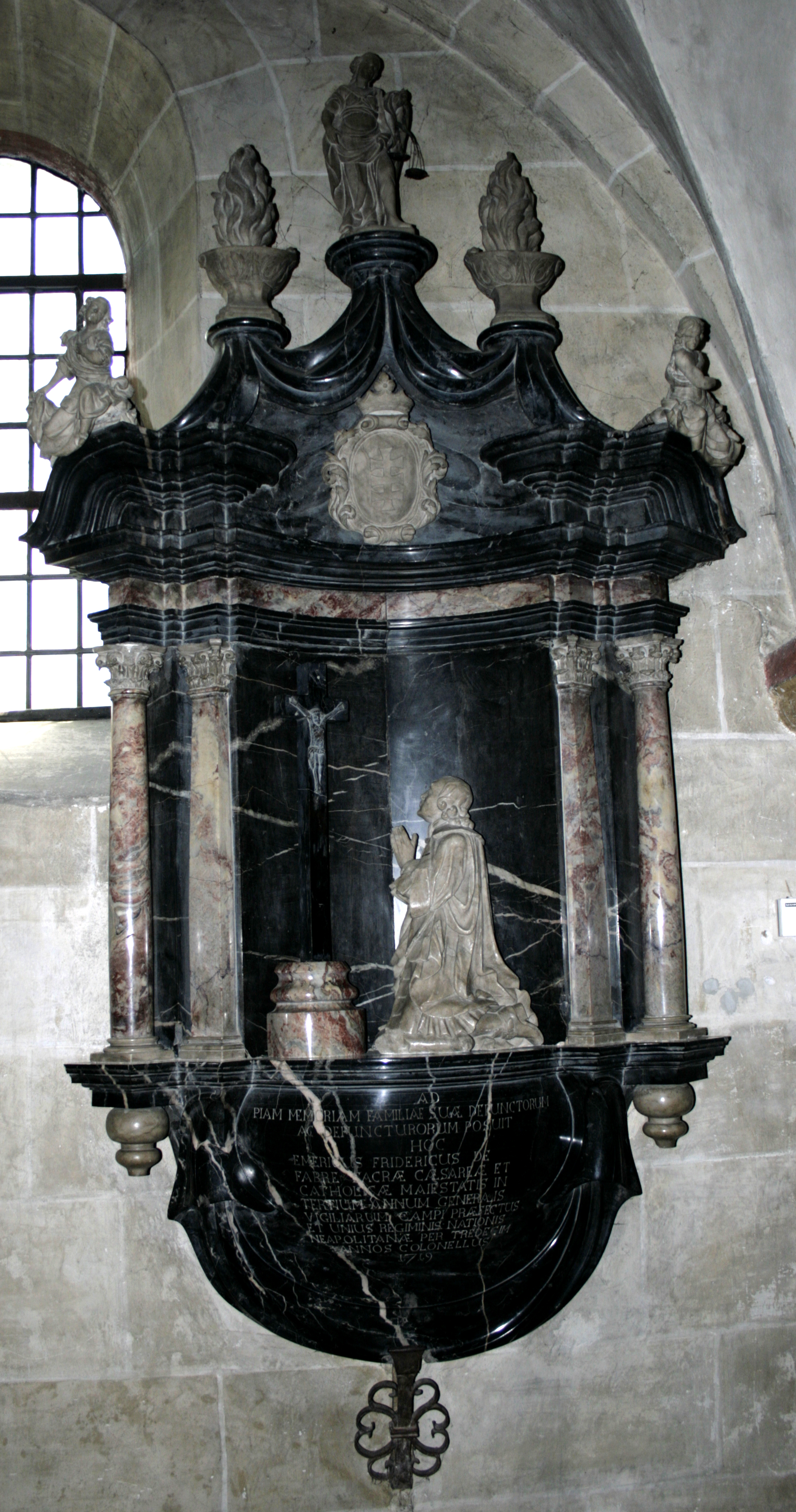 Lubentiusstift Dietkirchen, Deutschland, Epitaph von Emmerich Friedrich de Fabre von 1719